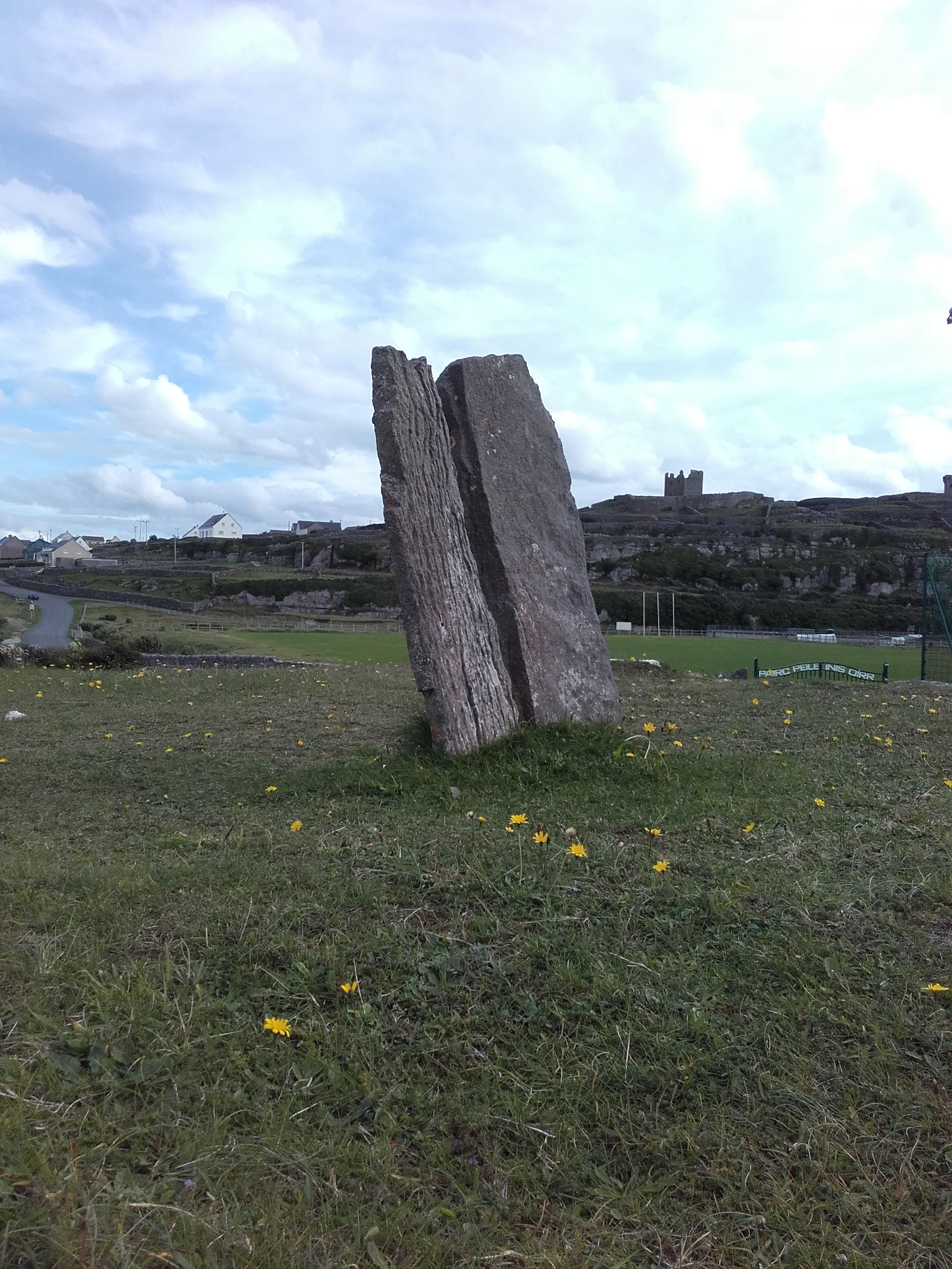 Cnoc Raithni, Inis Oírr.